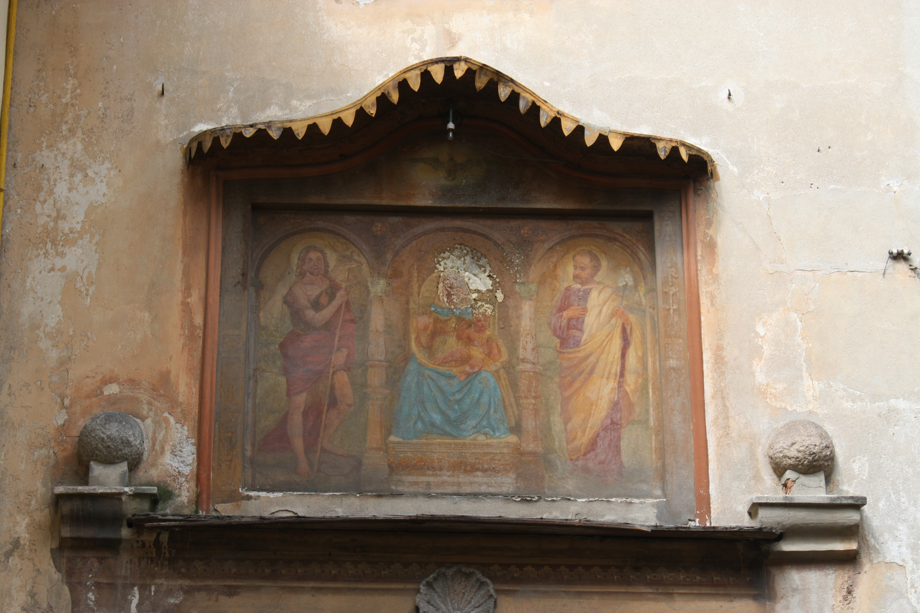 Affresco situato sulla parete esterna di casa Custodi a Busto Arsizio, raffigurante la Madonna dell'Aiuto.